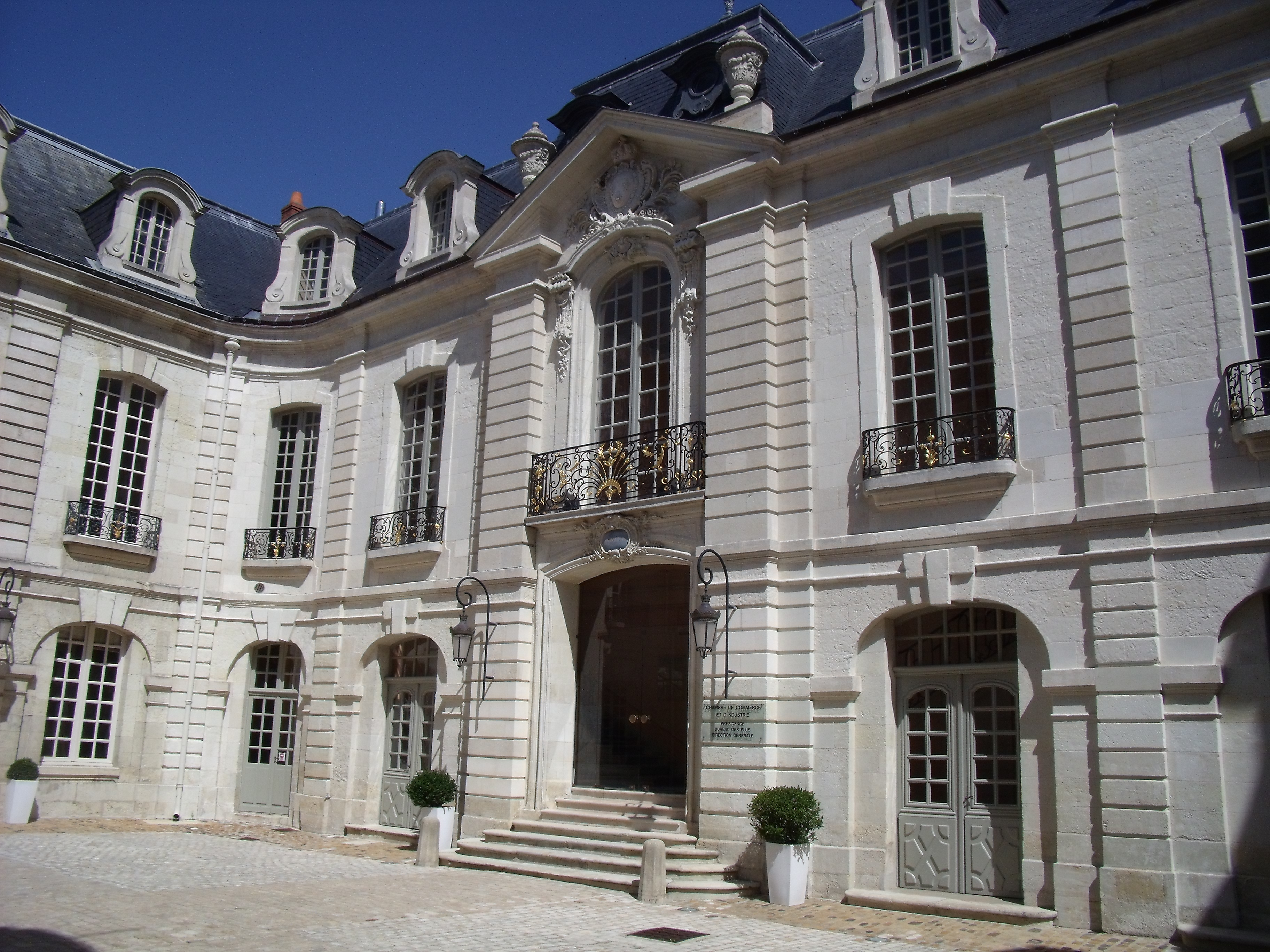 le palais du Commerce XVIIIe siècle, cour intérieur